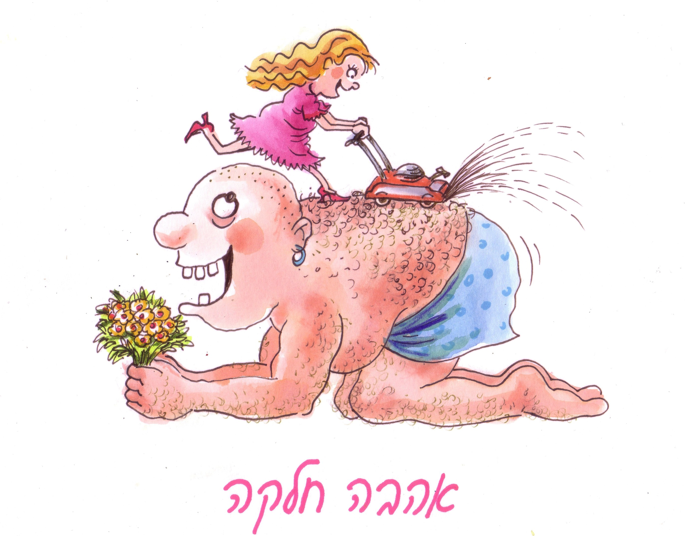 מתוך הספר באהבה